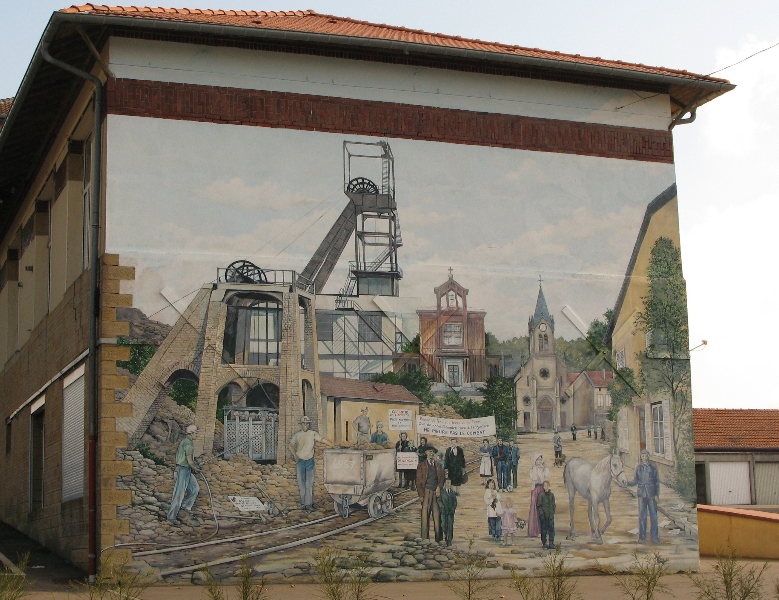 Fassade de maison à Crusnes